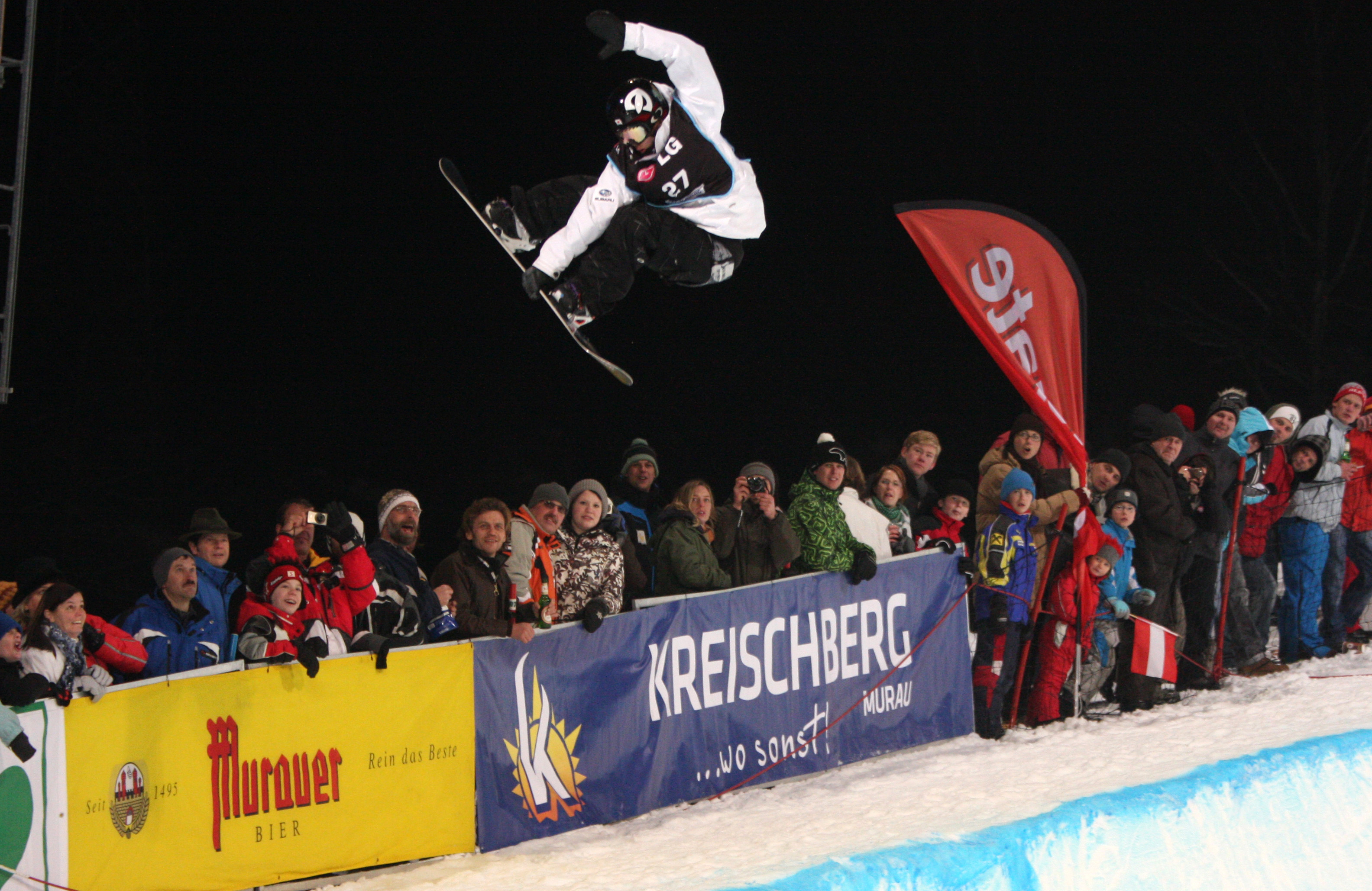 Kreischberg HP Kohei Kudo JPN